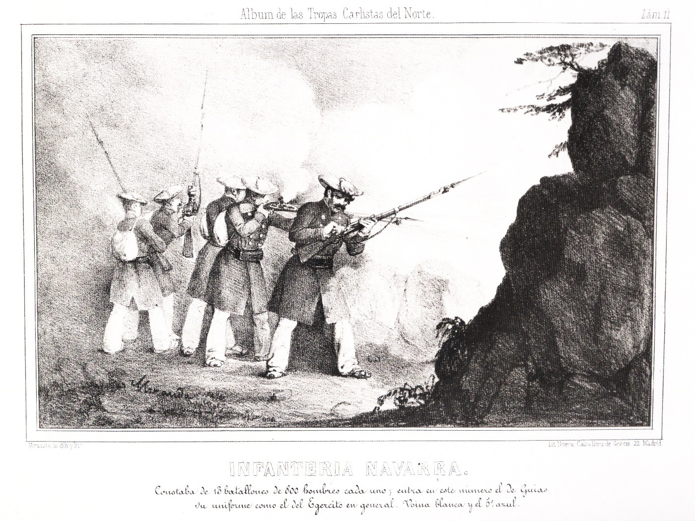 Infanteria Navarra. "Albúm de las Tropas Carlistas del Norte". Madrid, sin fecha. (184?)